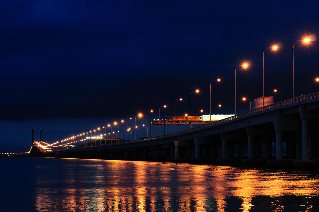 Penang Bridge